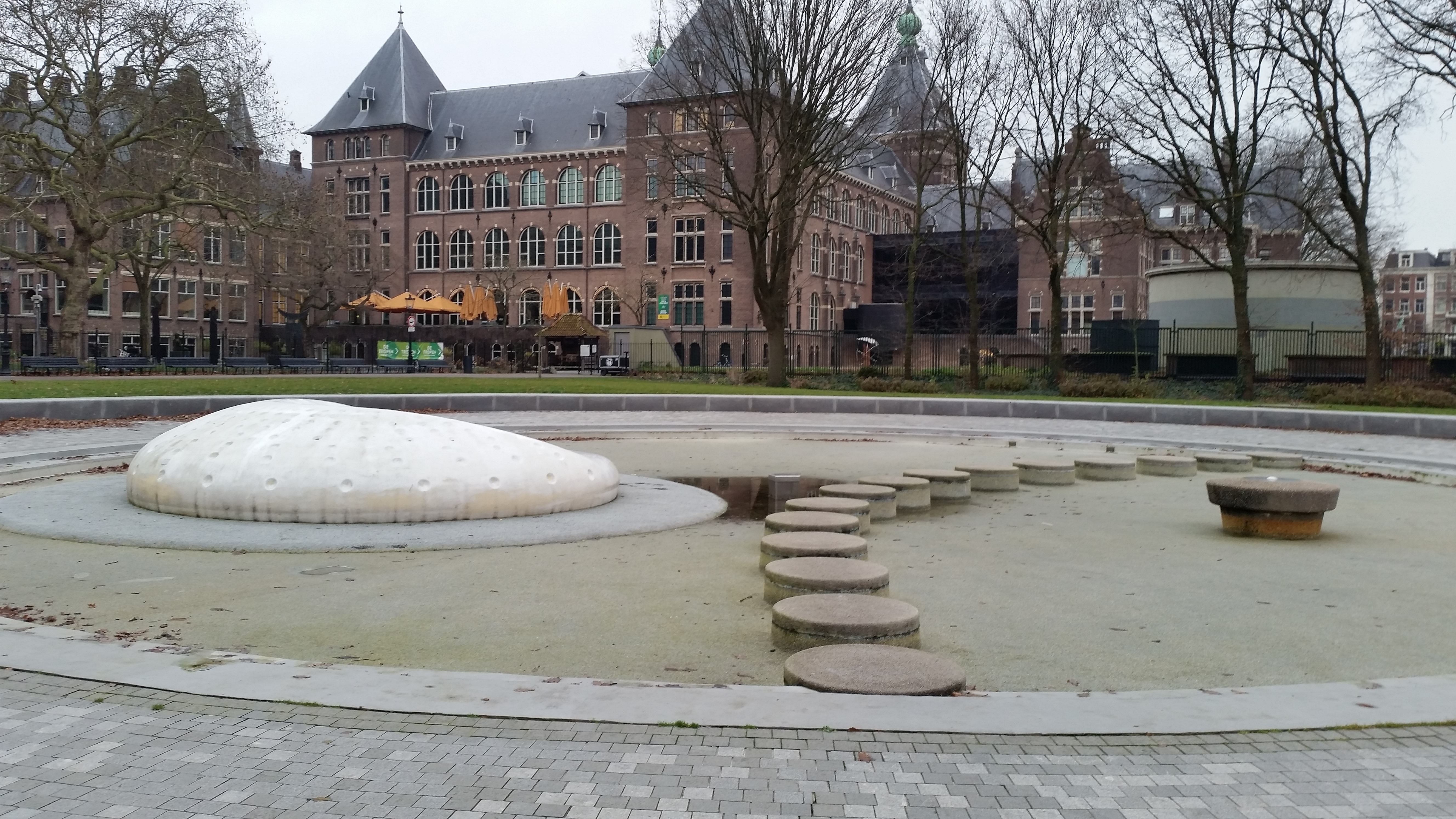 Pierenbadje in het Oosterpark, Amsterdam-Oost (december 2019)